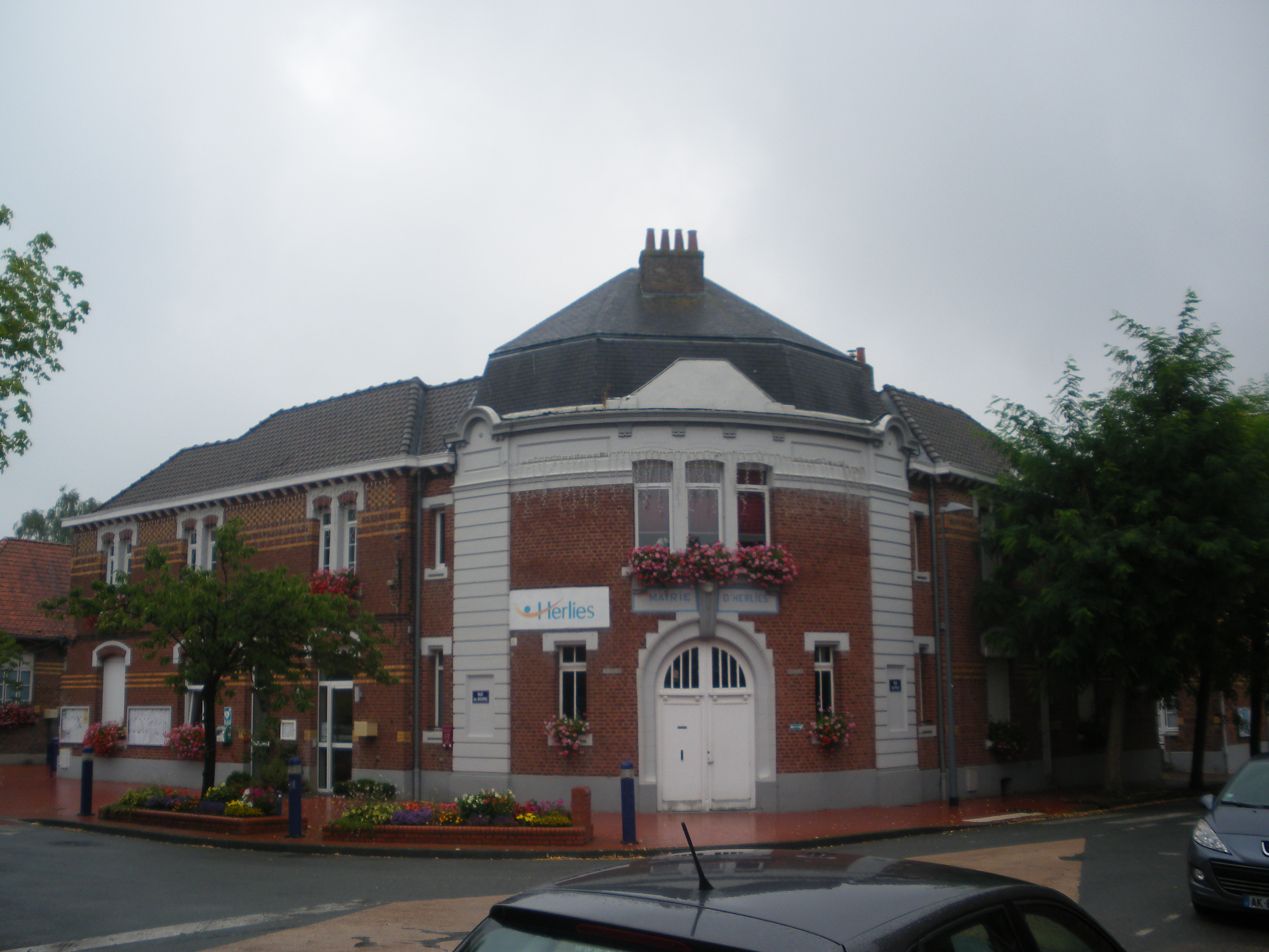 Vue de la mairie d'Herlies.